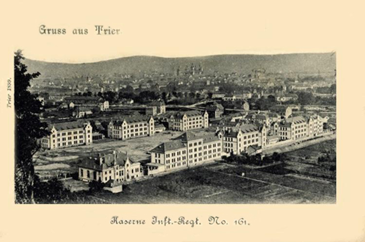 Die 161er Infanteriekaserne in Trier